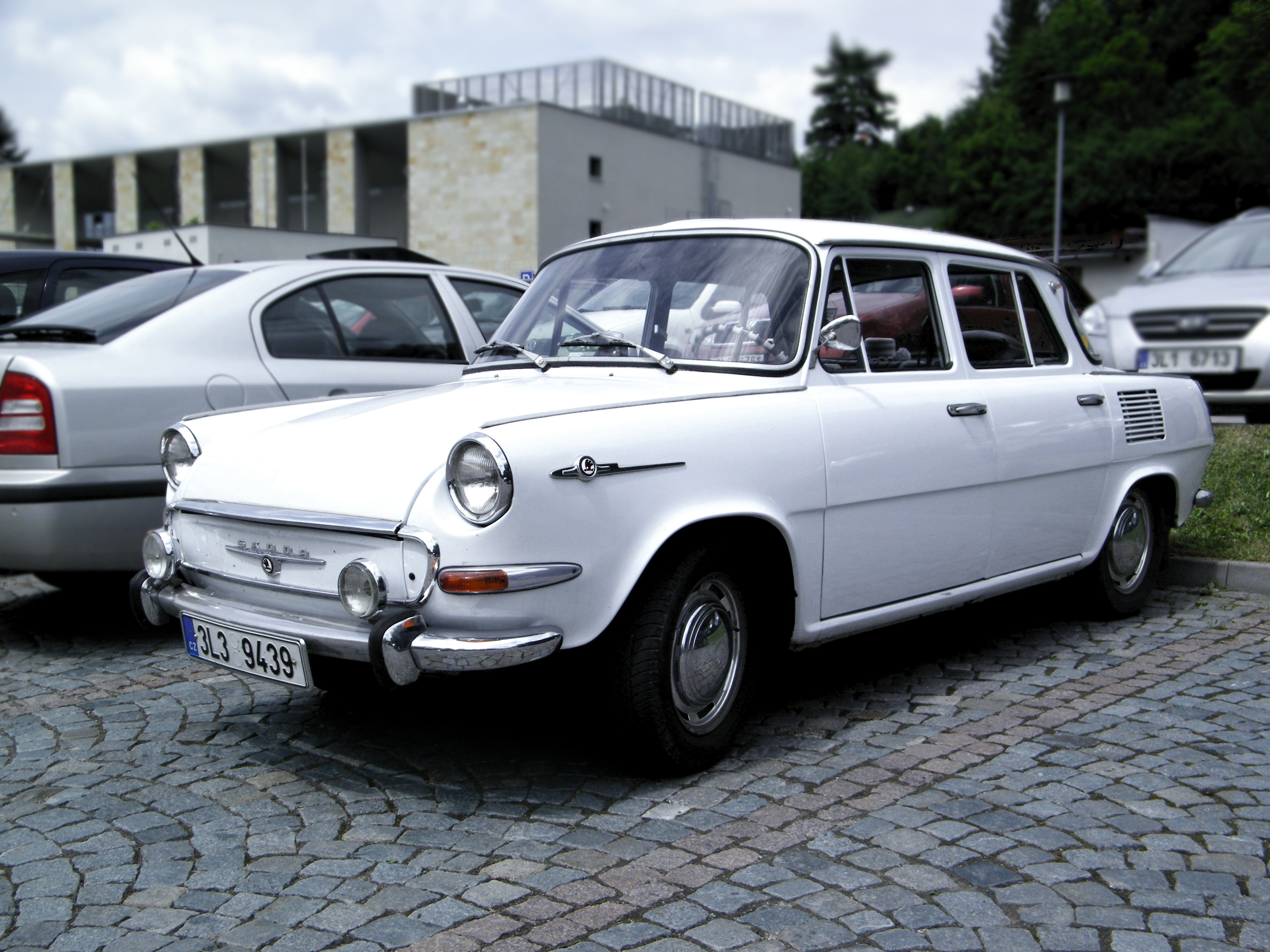 Škoda 1100 MB de Luxe Škoda 1100 MB de Luxe